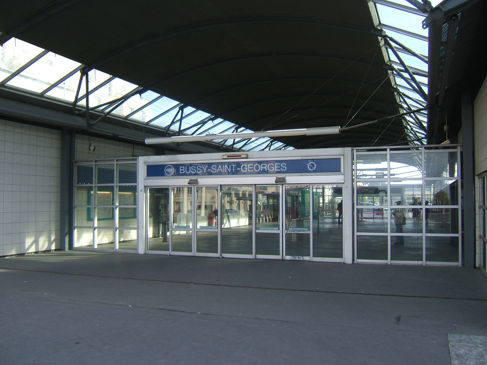 =Gare RER de Bussy-Saint-Georges (Seine-et-Marne, France)